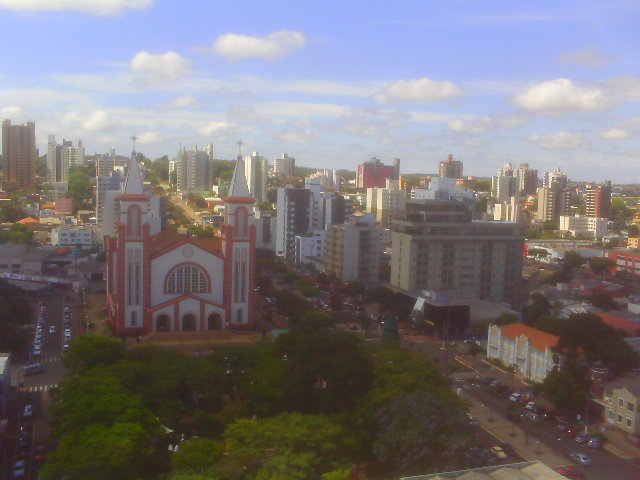 Chapecó